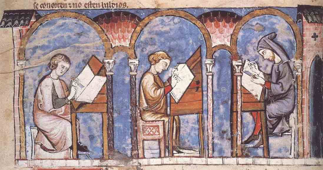 Iluminura do Libro dos Jogos, de Afonso X de Leão e Castela, de 1283. A imagem mostra três copists trabalhando no scriptorium